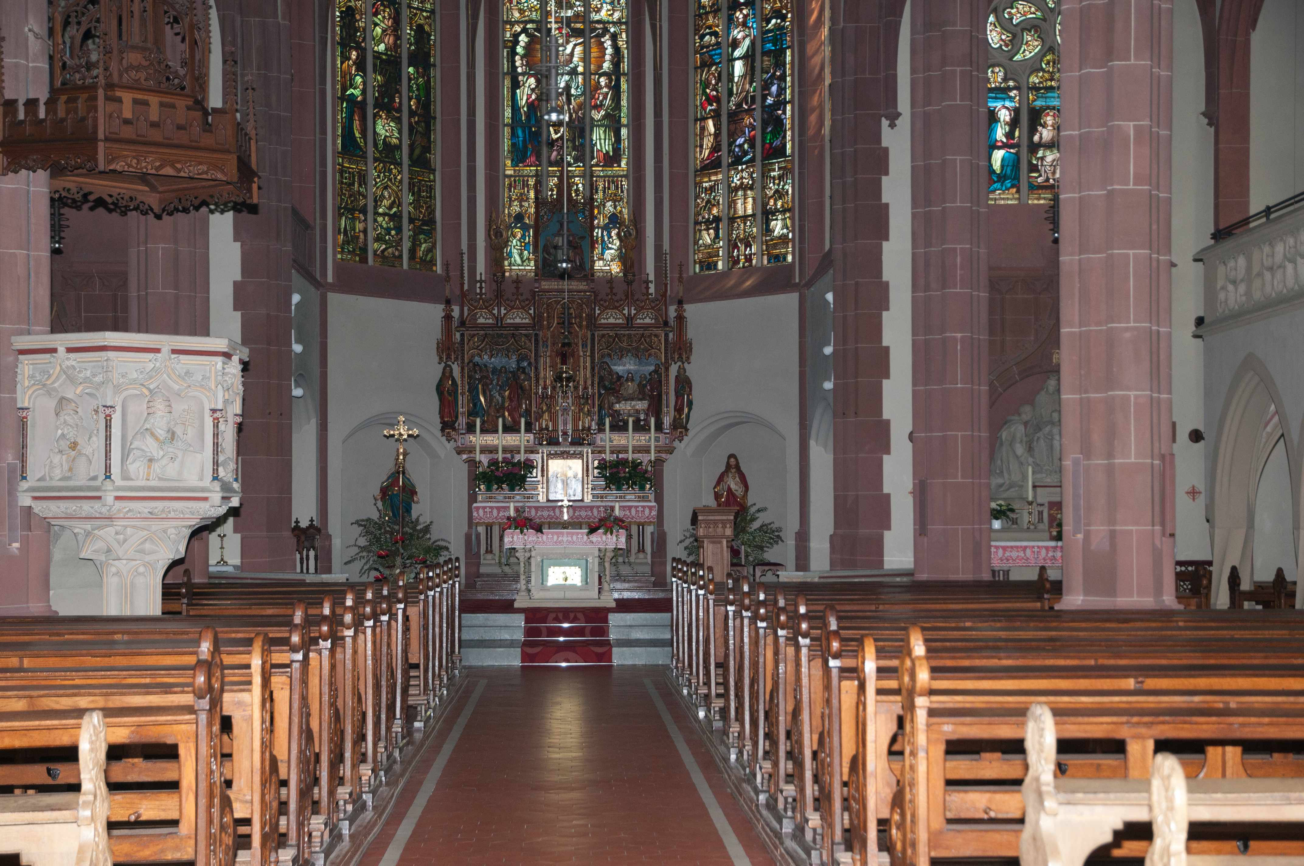 Mittelschiff mit Altar und Kanzel